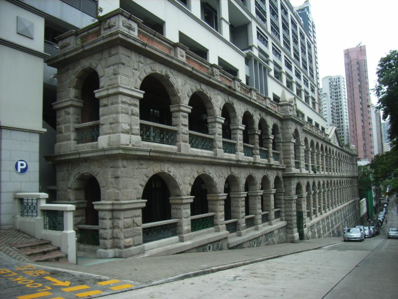 西營盤社區綜合大樓位於高街與zh:東邊街及般咸道之間, 是香港一級歷史建築. Sai Ying Pun Community Complex, High Street, Sai Ying Pun, Hong Kong